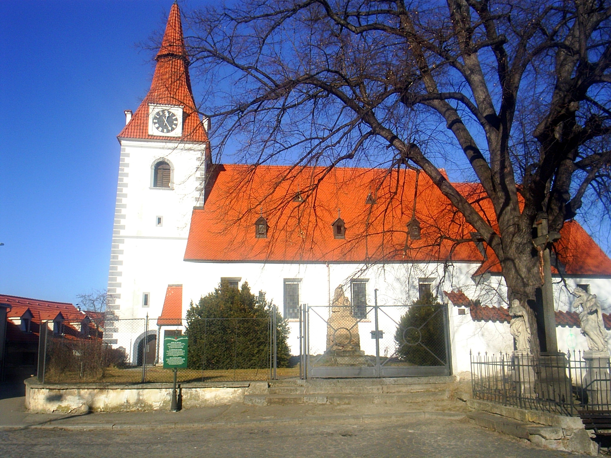 Netolice- kostel sv. VáclavaEsperanto: Netolice- pregxejo de Sankta Venceslao